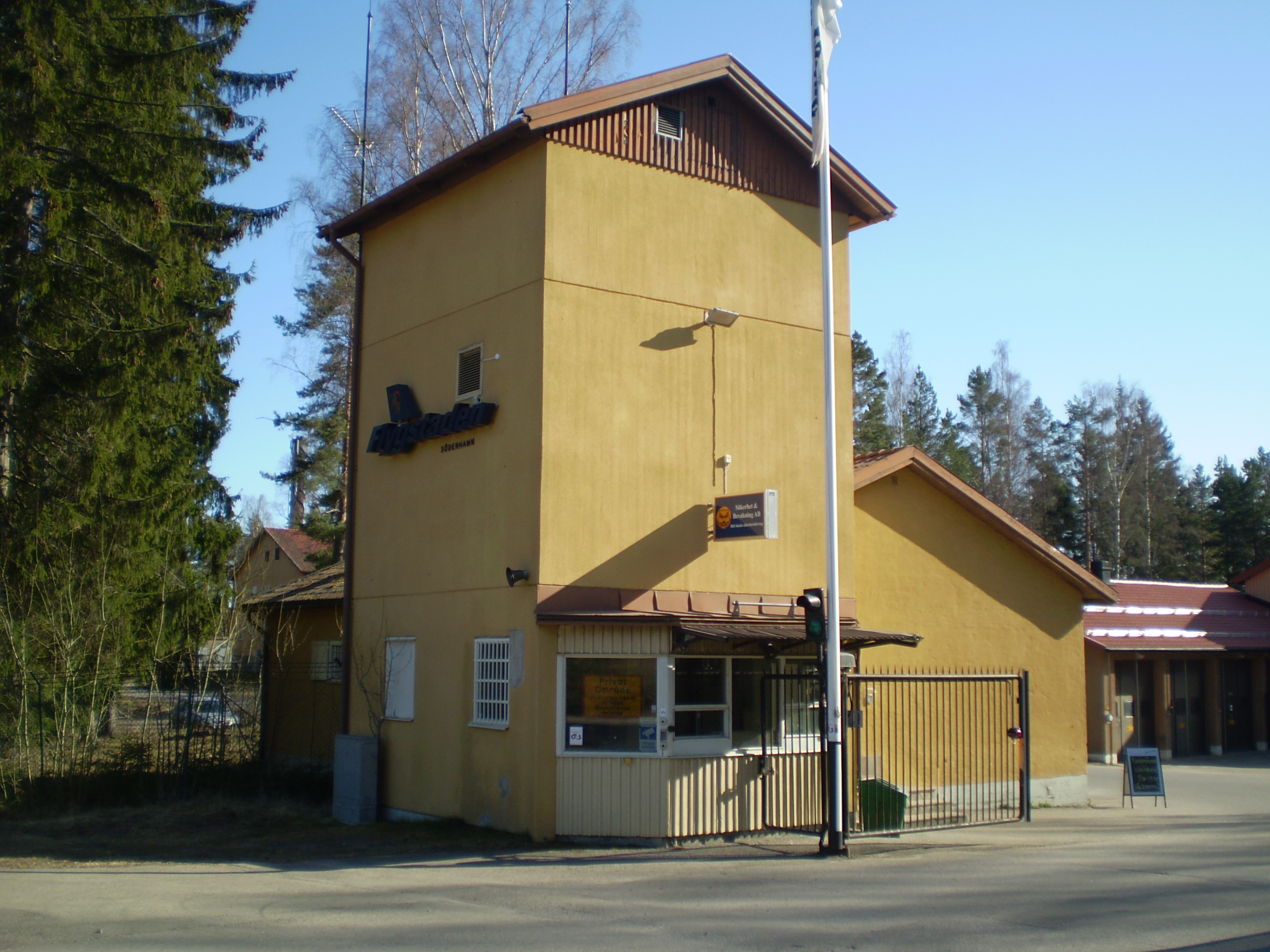 Flottiljvakten vid F 15 Söderhamn